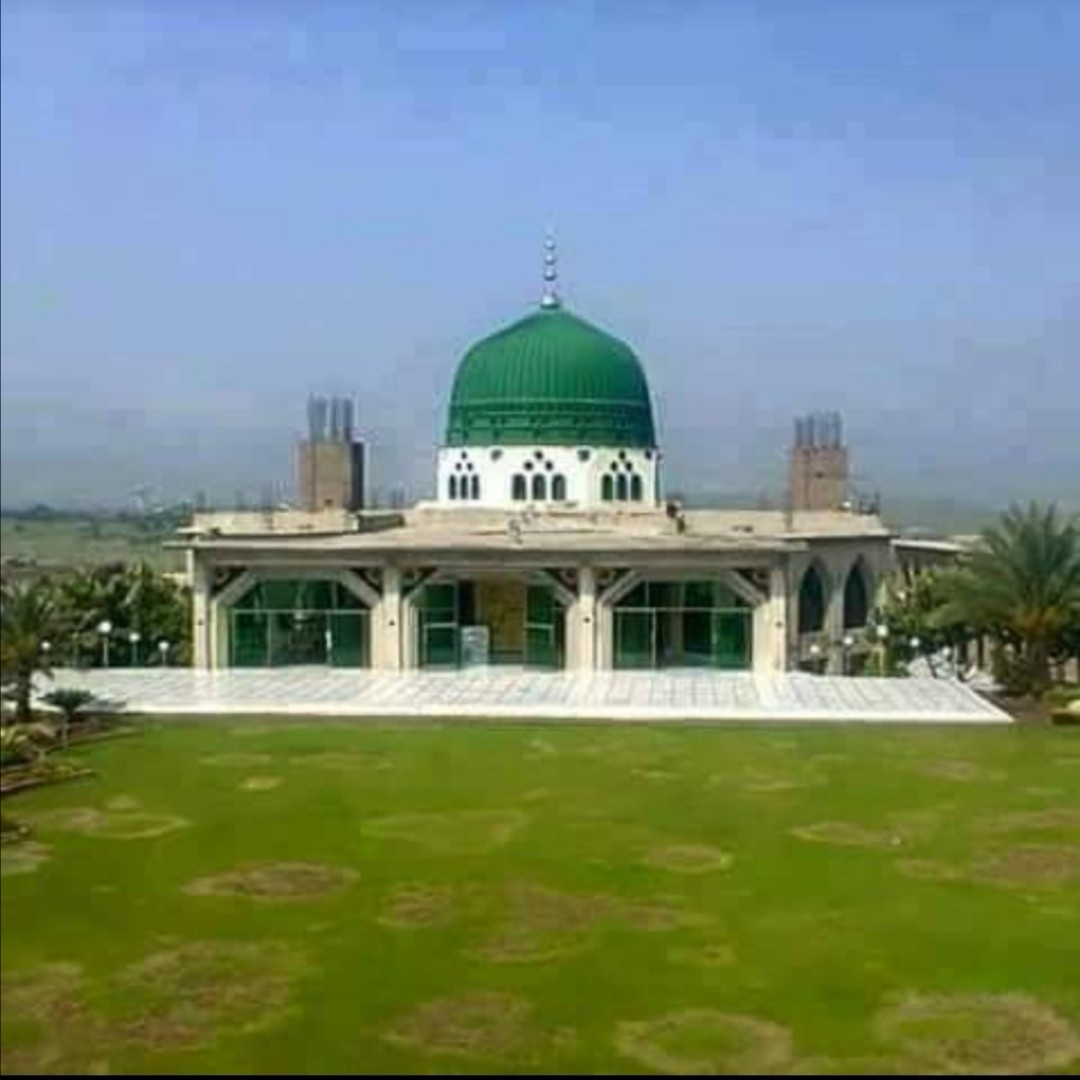 خانقاہ محمدیہ سیفیہ سرفراز العلوم اسلام آباد